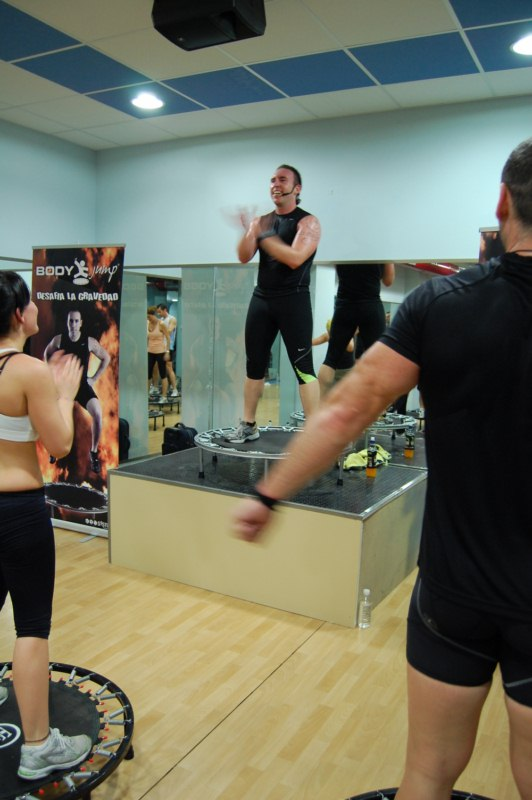 Ernesto Acosta en una sesion de bodyjump